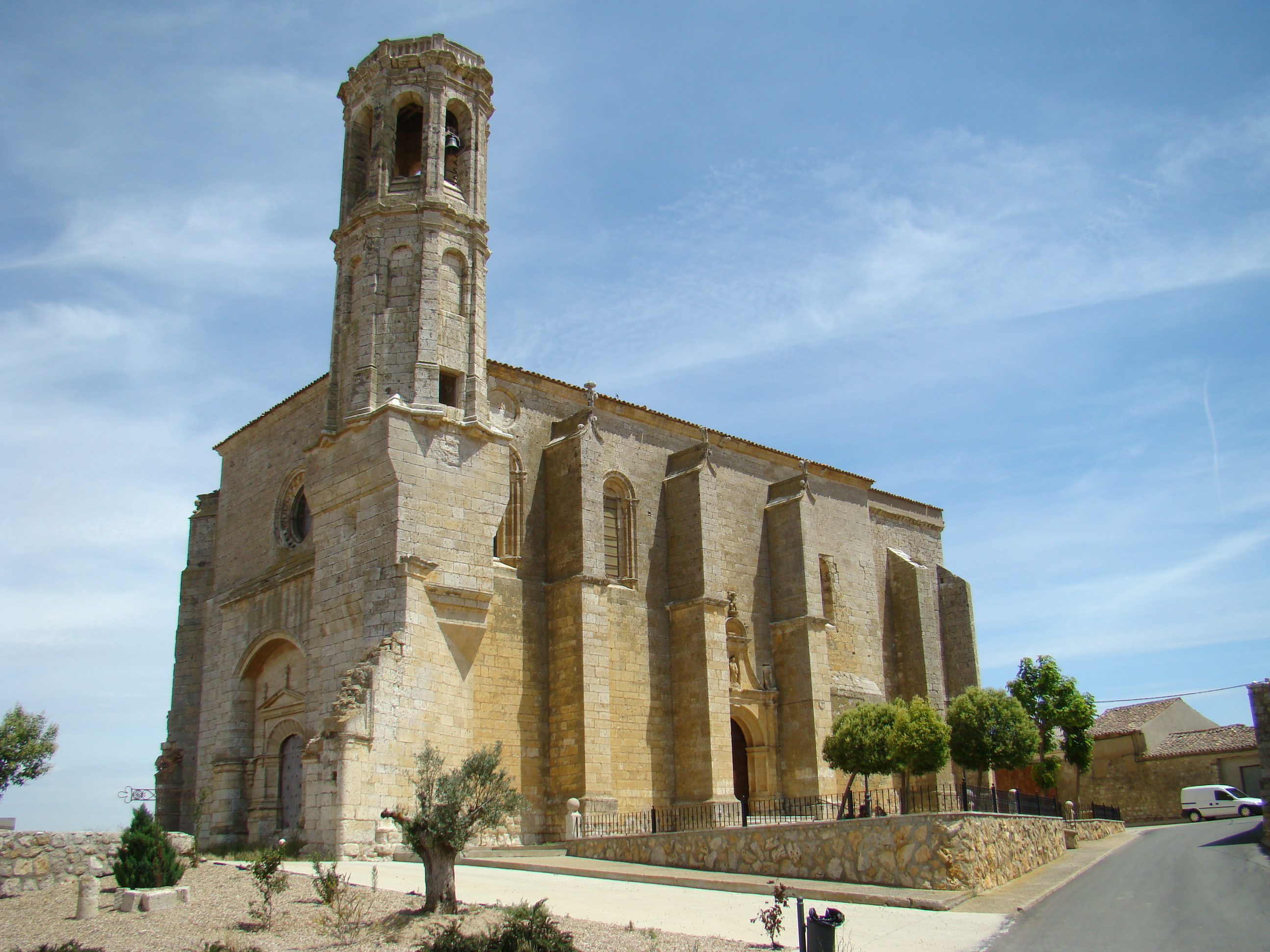 Villanueva de San Mancio en la provincia de Valladolid, España. Iglesia de Santa María de Mediavilla. Se ven las dos puertas y el rosetón en la fachada oeste.